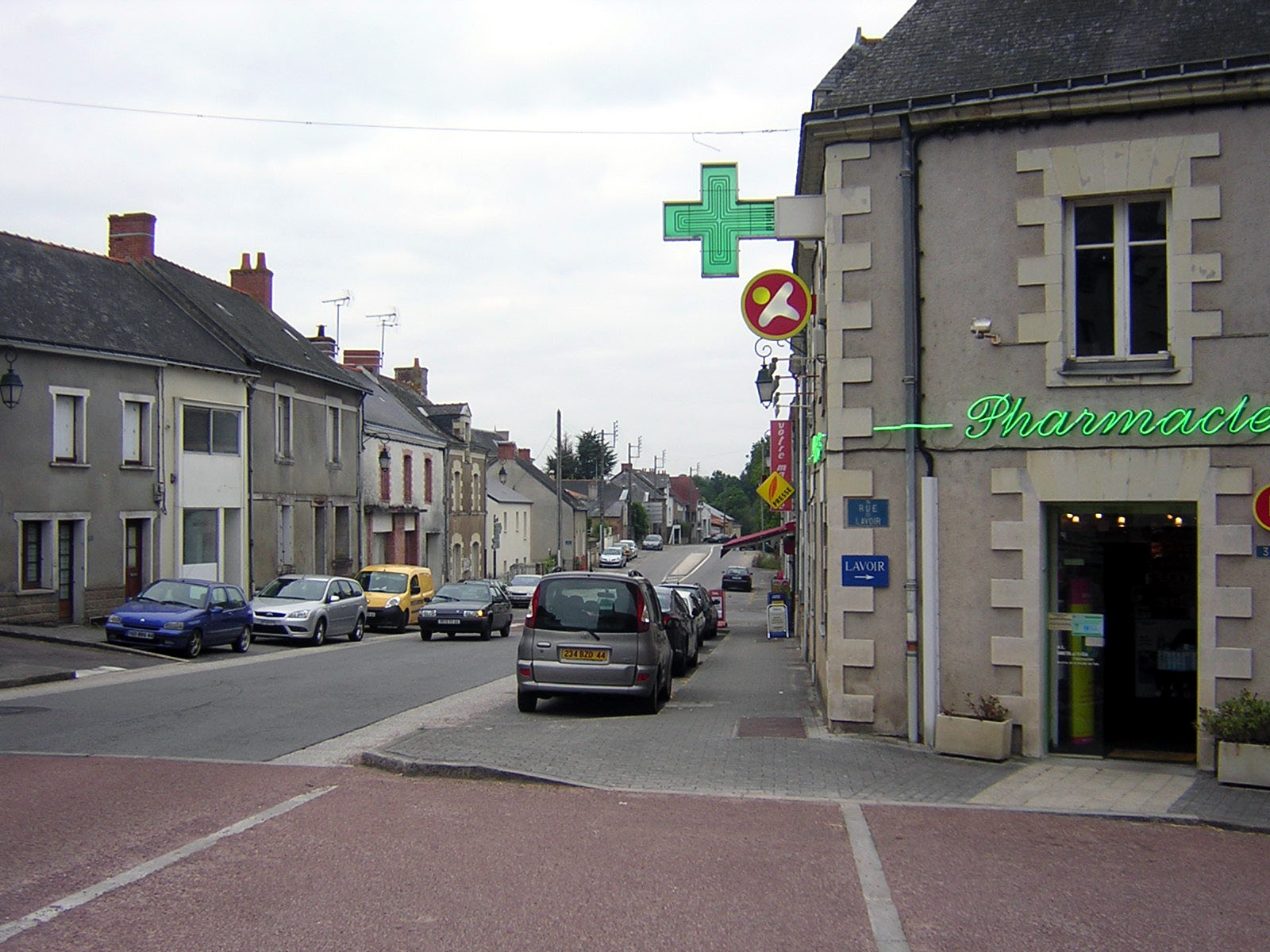 Pharmacie (Joué-sur-Erdre)